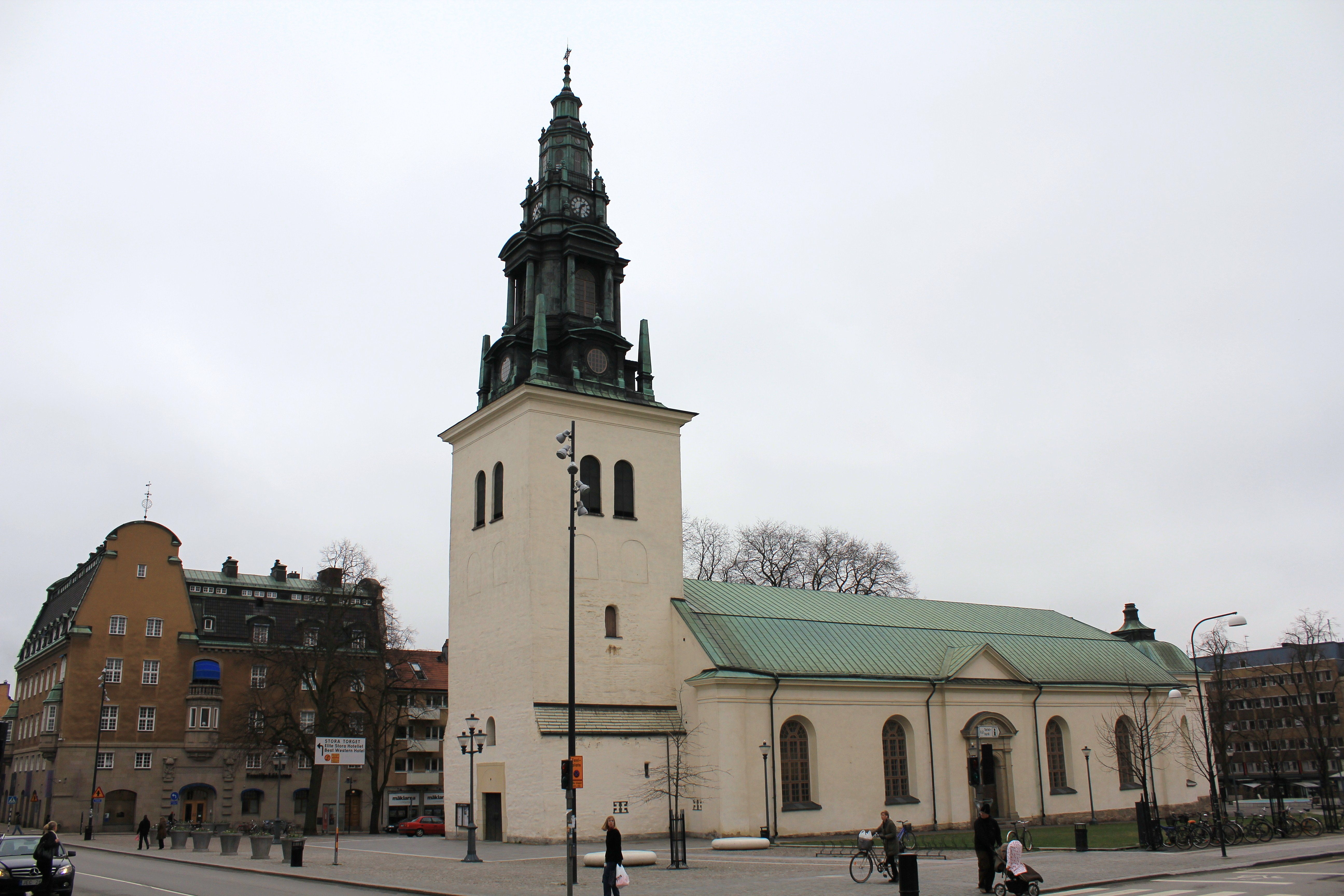 Sankt Lars kyrka i Linköping.